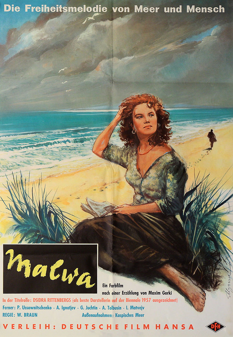 Filmplakat zum Film: "Malwa" mit Dzidra Ritenberga (Dsidra Rittenbergs) in der Hauptrolle